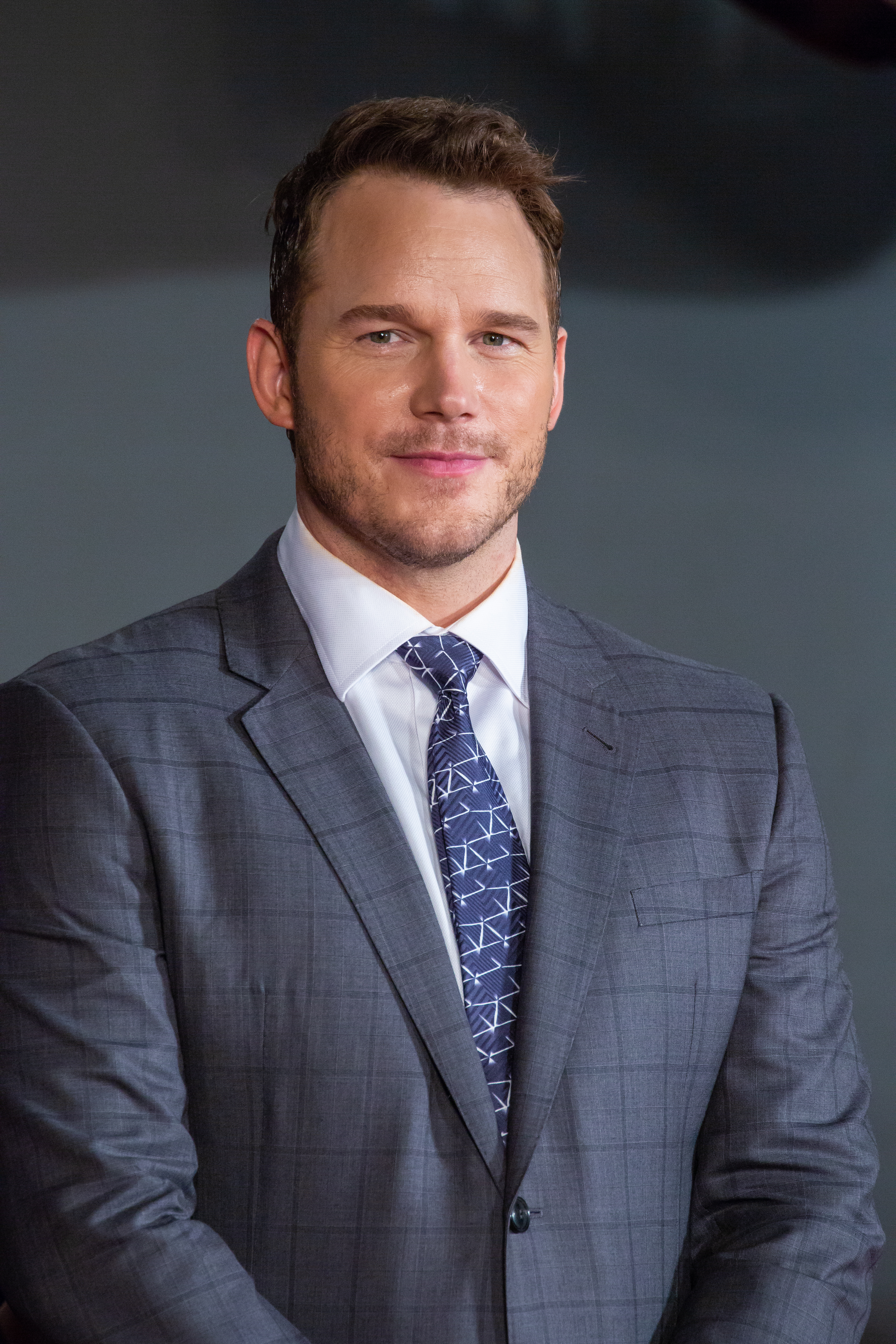 ジュラシック・ワールド/炎の王国 ジャパン・プレミア レッドカーペット クリス・プラット